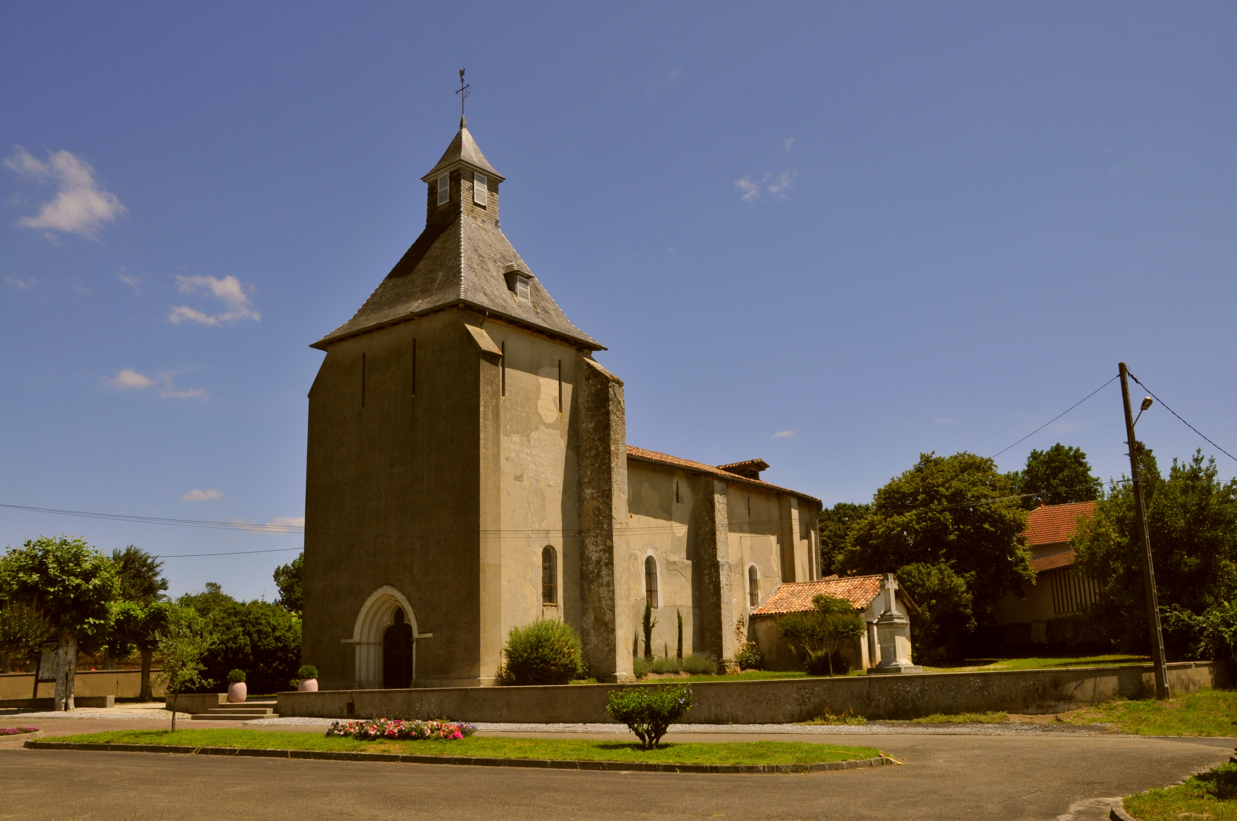 Taller (Landes), l'église